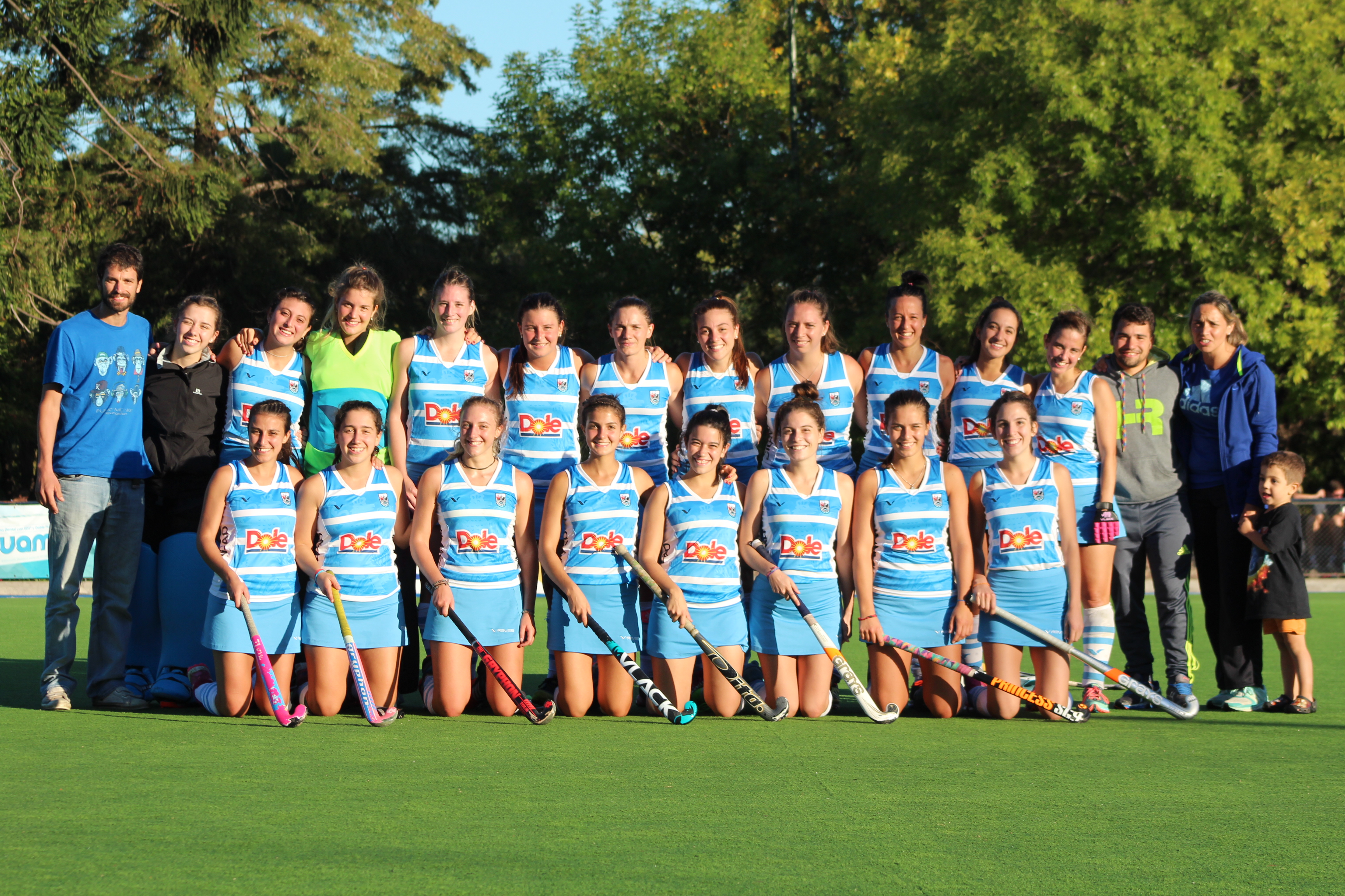 Ciudad B 2017